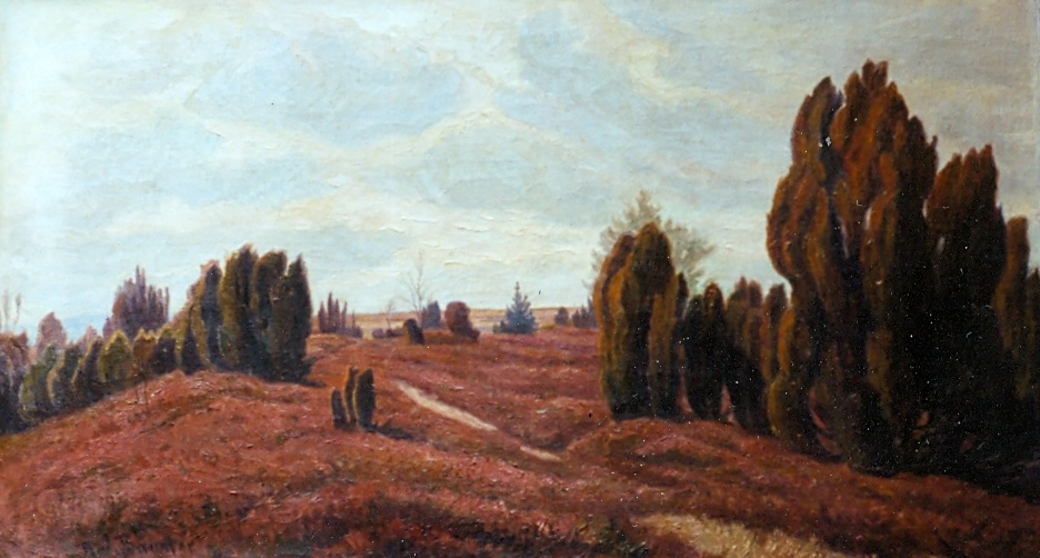 Ölgemälde auf Leinwand, 58 x 109, Sign. u. li. Rud Bäumer, Charakteristisches Suijet seiner Malerei ab ca. 1895